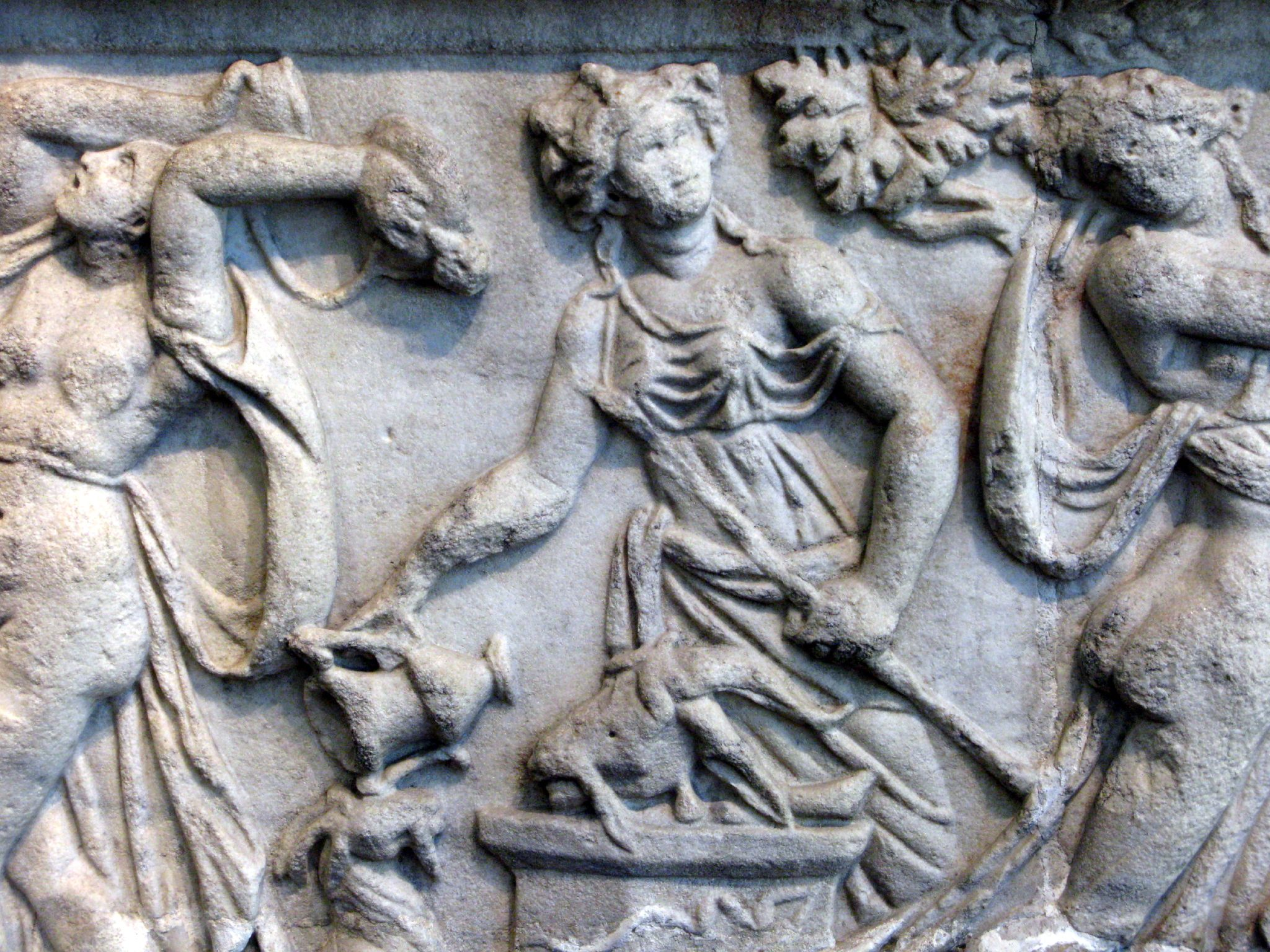 Marmeren Romeinse sarcofaag. APM 10.854. Ca 260-280 n. Chr. Rond 100 n. Chr. werden de doden door de Romeinen niet meer gecremeerd maar bijgezet in marmeren sarcofagen. De sarcofagen werden vaak versierd met mythologische taferelen. In dit geval staat de god Dionysus centraal. In zijn gevolg zien we de vrouwelijke volgelingen van de god van de wijn die muziek maken en een bokje offeren. roman sarcophagus dedicated to dionysus, 270 AD